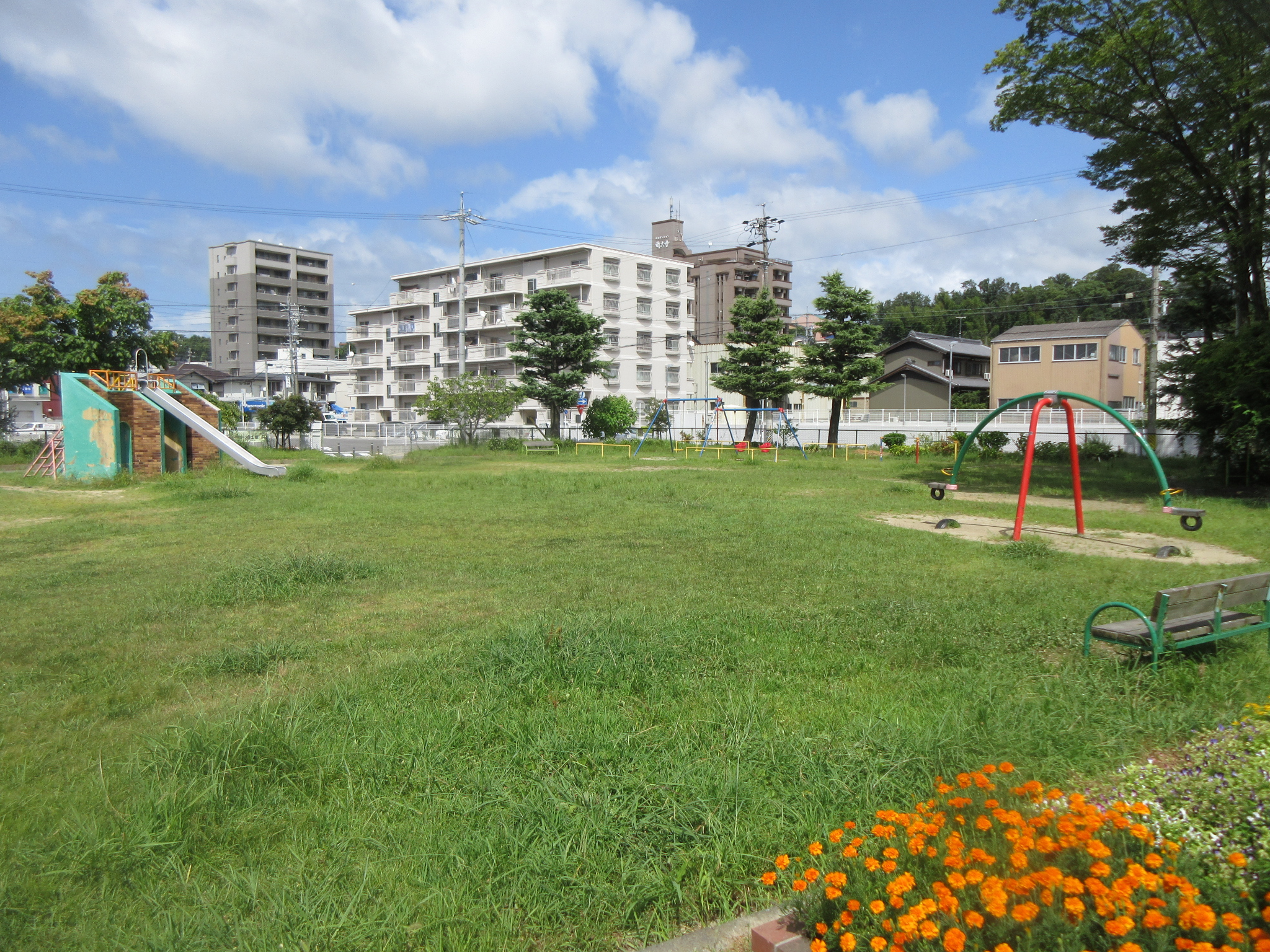 沖折戸公園（岡崎市南明大寺町）